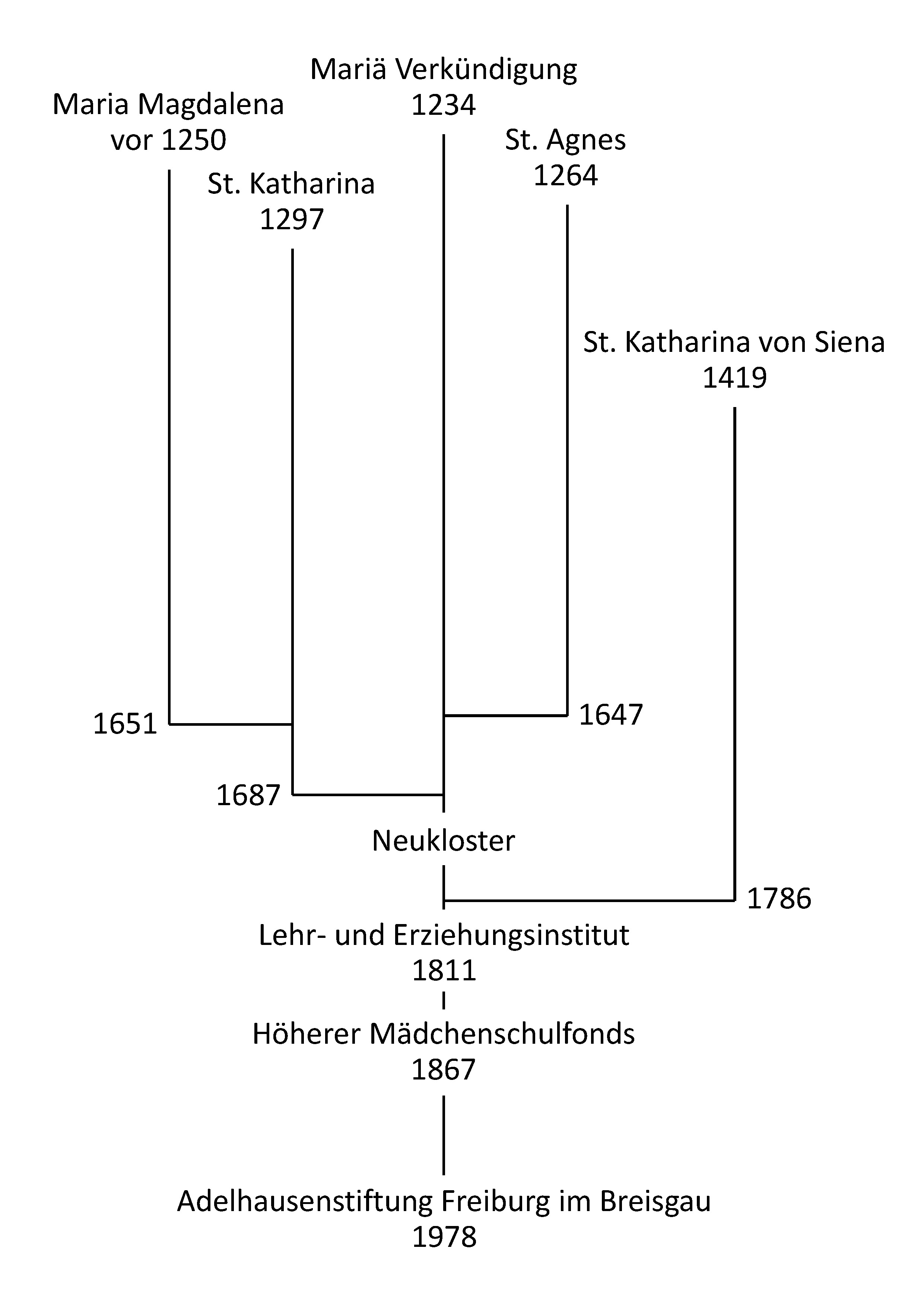 "Stammbaum" der Freiburger Dominikanerinnenklöster